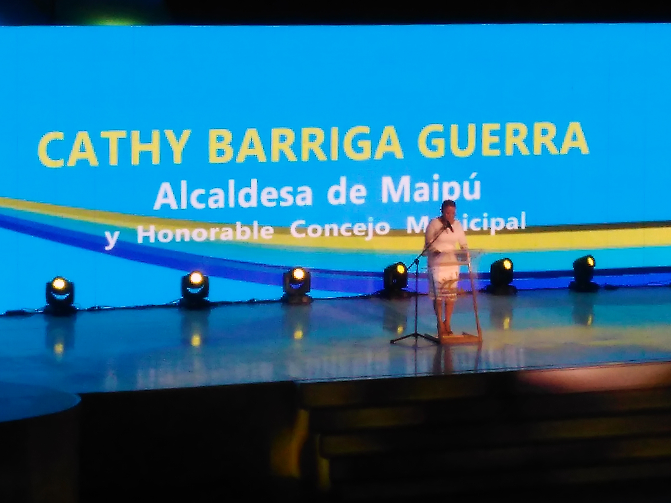 La alcaldesa de Maipú, Cathy Barriga Guerra, durante su Cuenta Pública del periodo 2018. Evento realizado el viernes 26 de abril de 2019 en la Pista de Patinaje Los Toros.